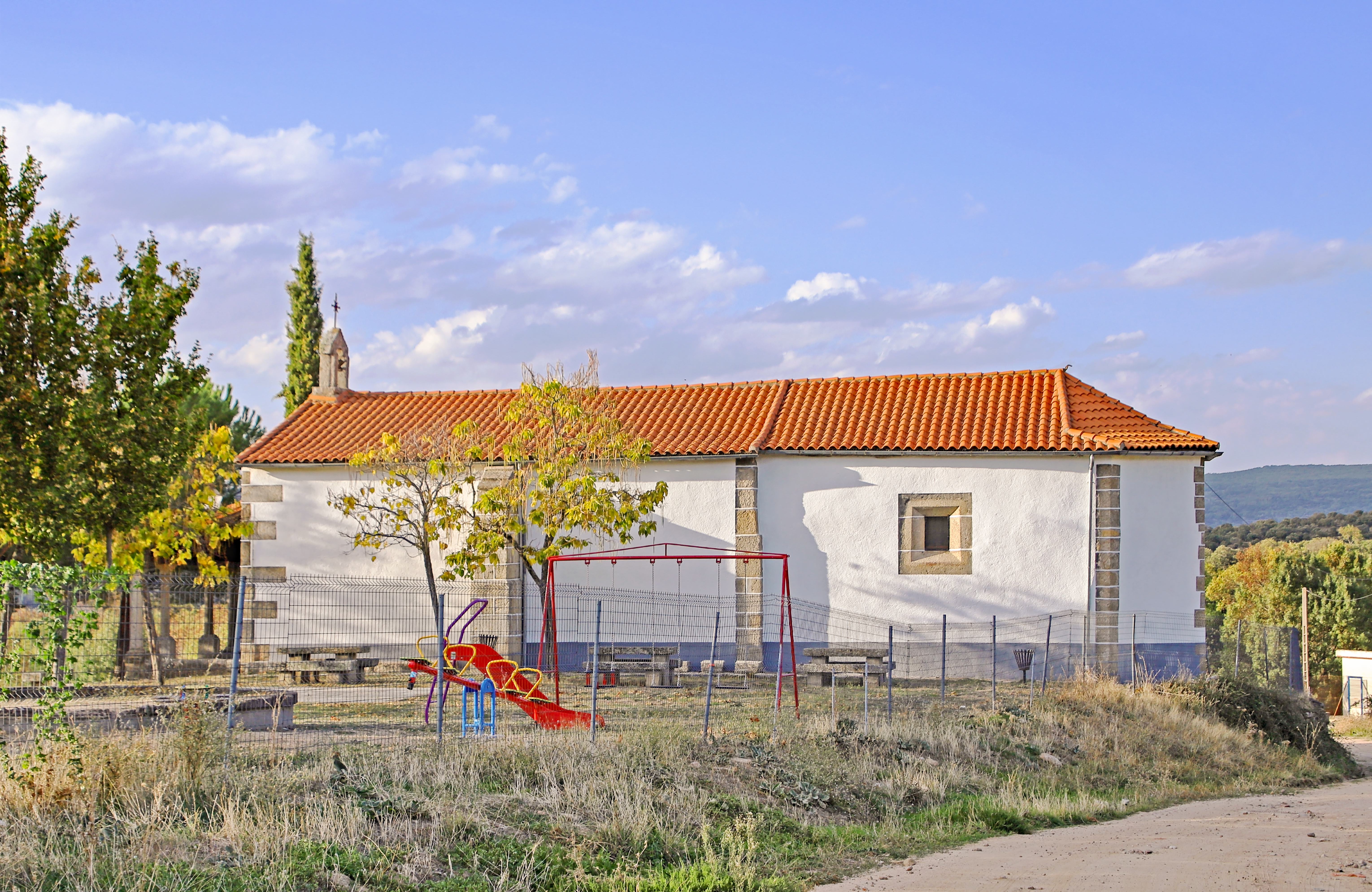 Ledrada es un municipio de la comarca Sierra de Béjar, provincia de Salamanca.